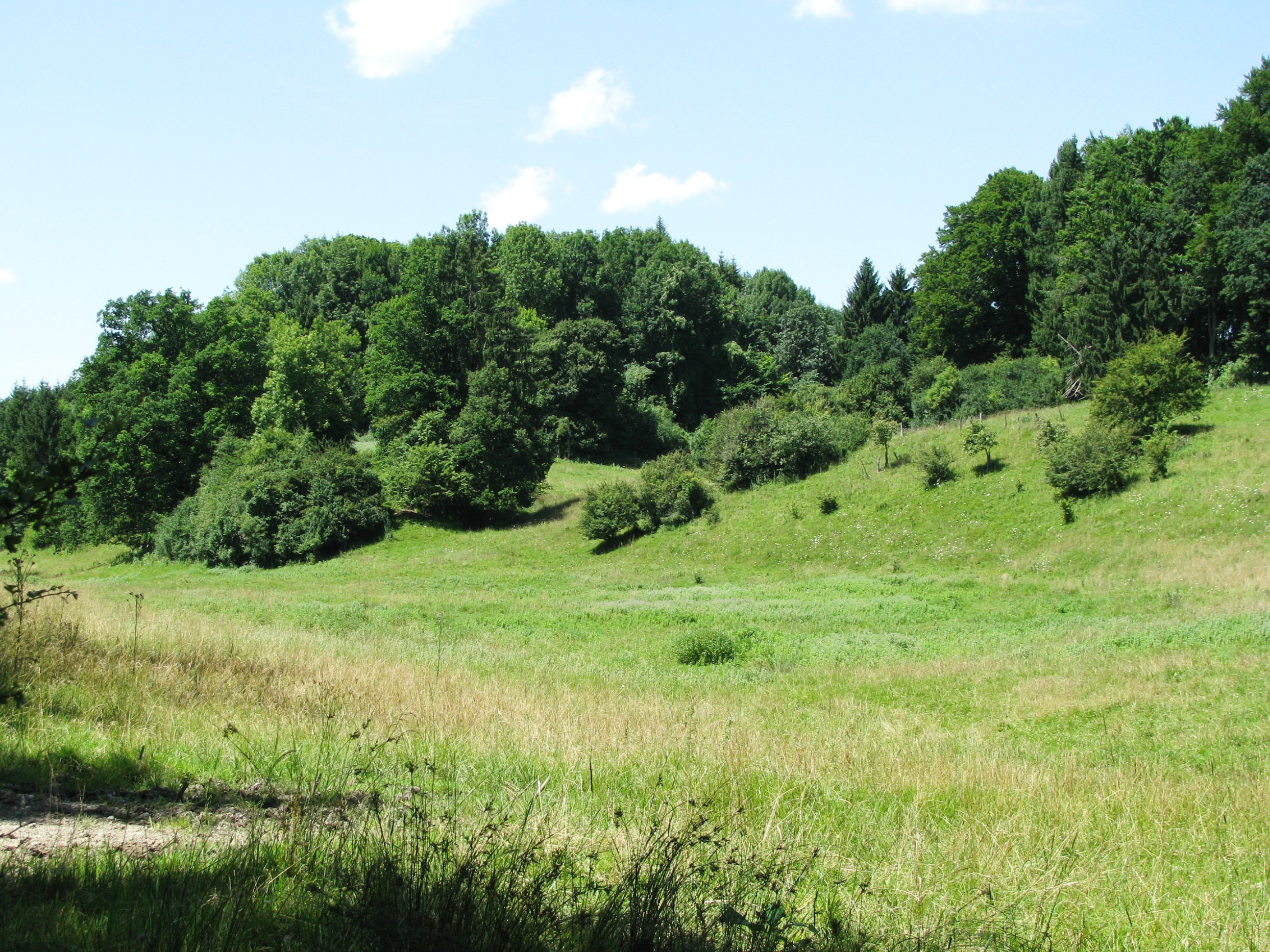 Burgstall Willenberg; Ansicht des Burghügels („Schloßberg“) von Südosten.